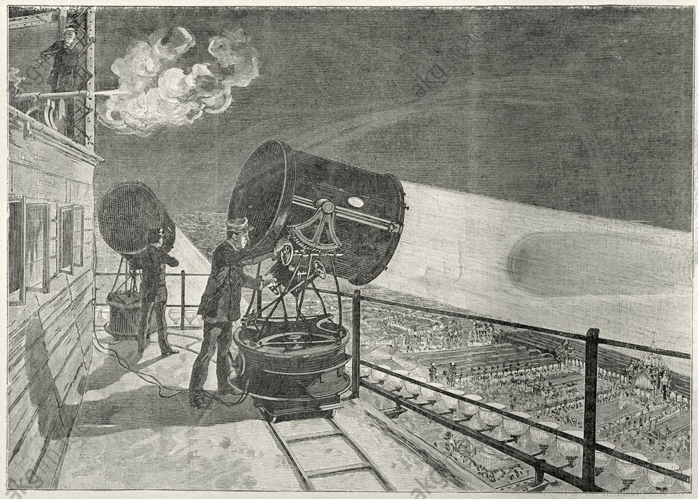 'Manoeuvre des projecteurs sur la Tour Eiffel' AKG Images, reference n°: 5FK-P1-D17-1889-23-B